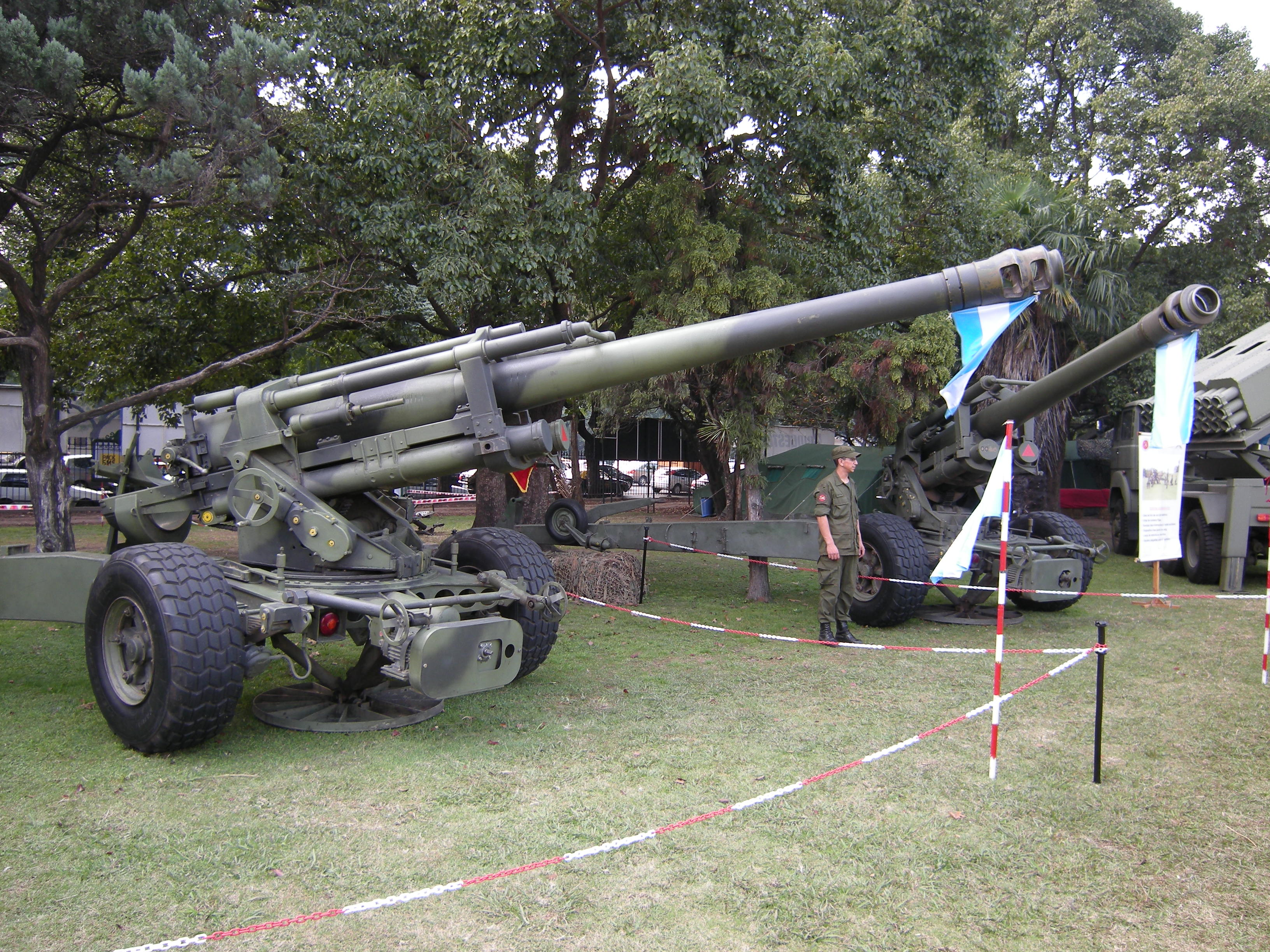 Cañones CITER L33 de 155 mm, durante la Exposición del Ejército Argentino realizada en mayo de 2008